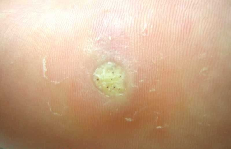 Plantar Warze dunkle Punkte